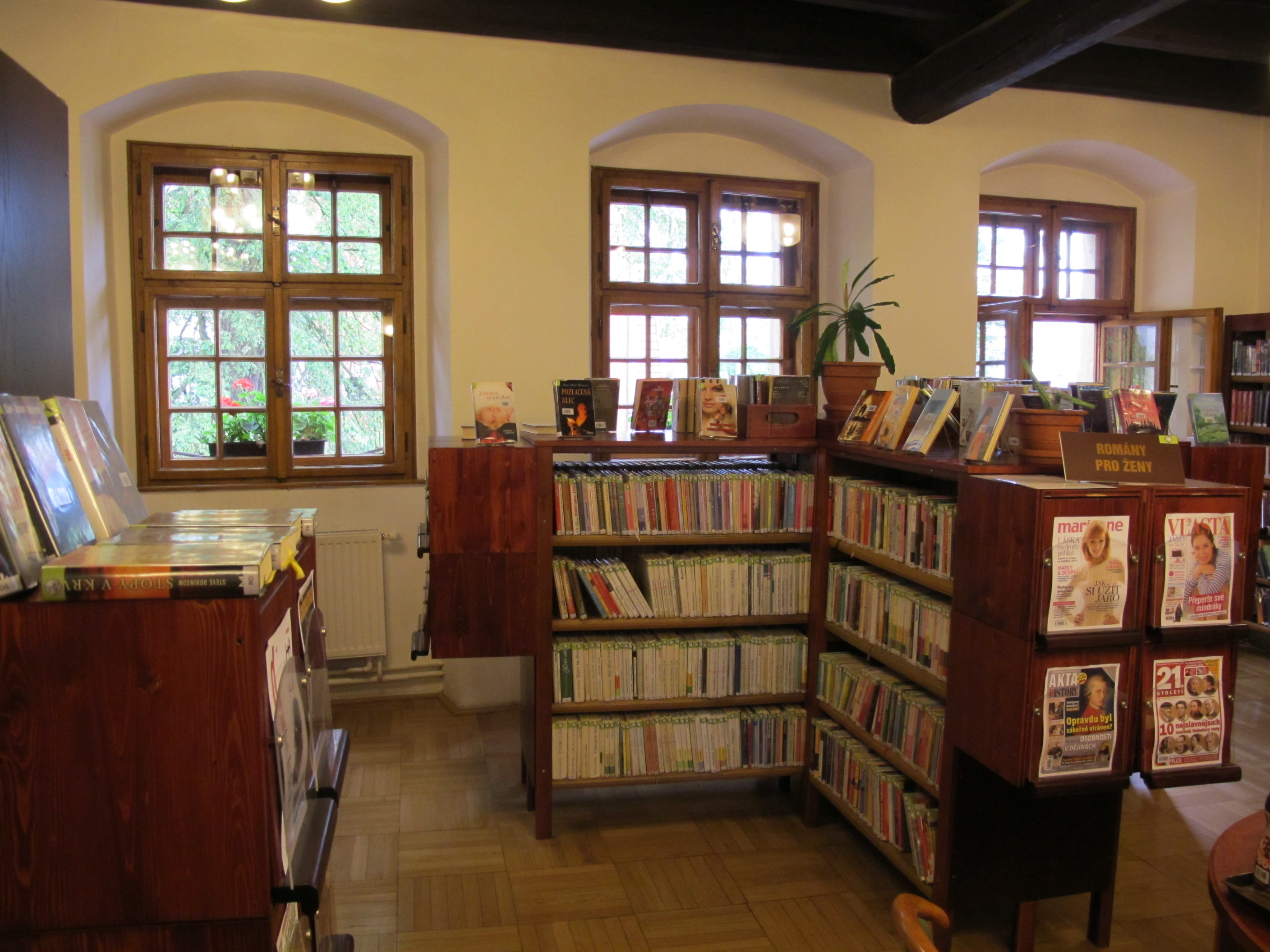 Špitál, náměstí Svobody 675/11, Litovel. Oddělení pro dospělé. This file was uploaded during the project of WikiTown Litovel.